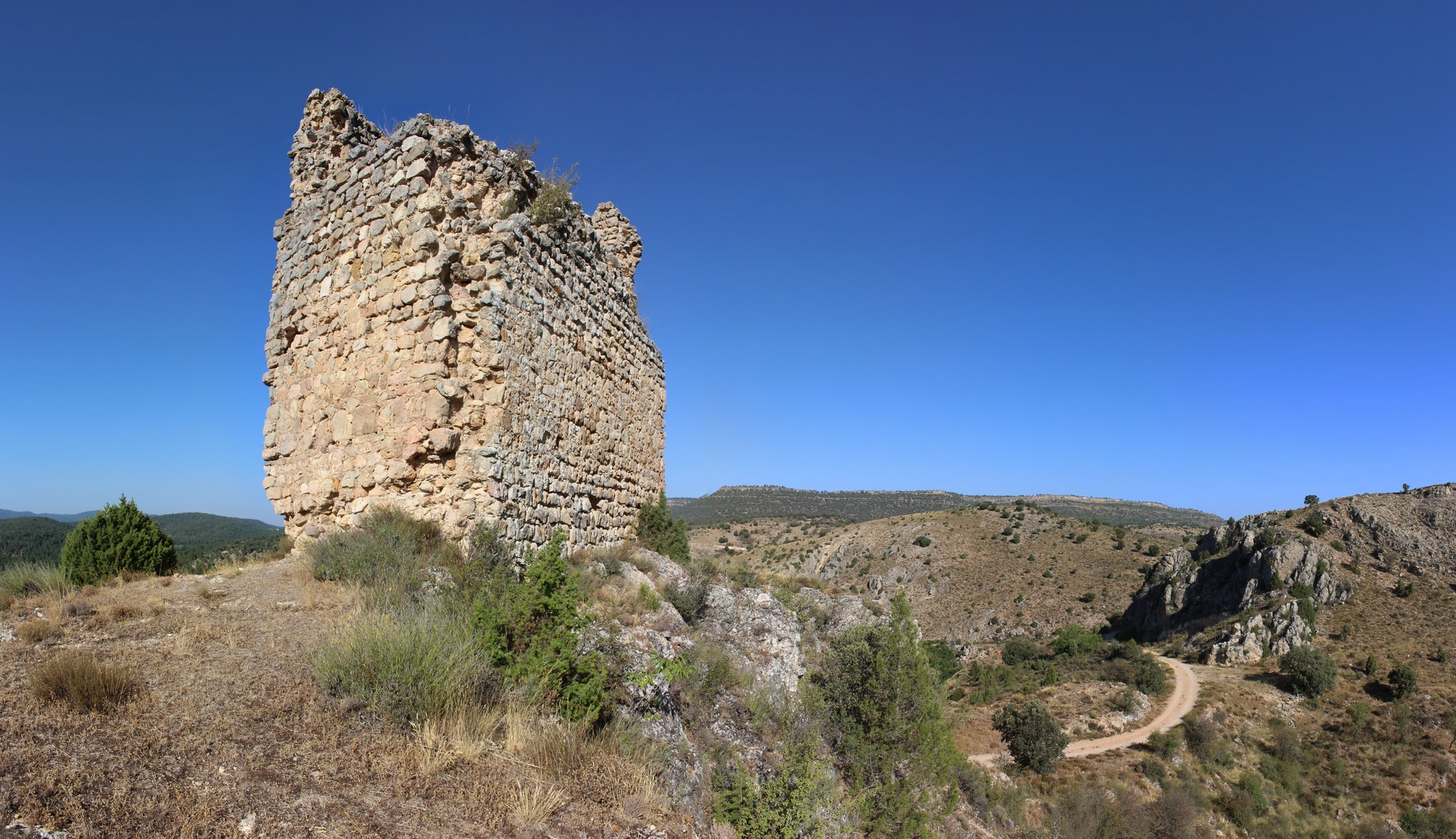 Torre del homenaje del castillo de Alcalá de la Vega